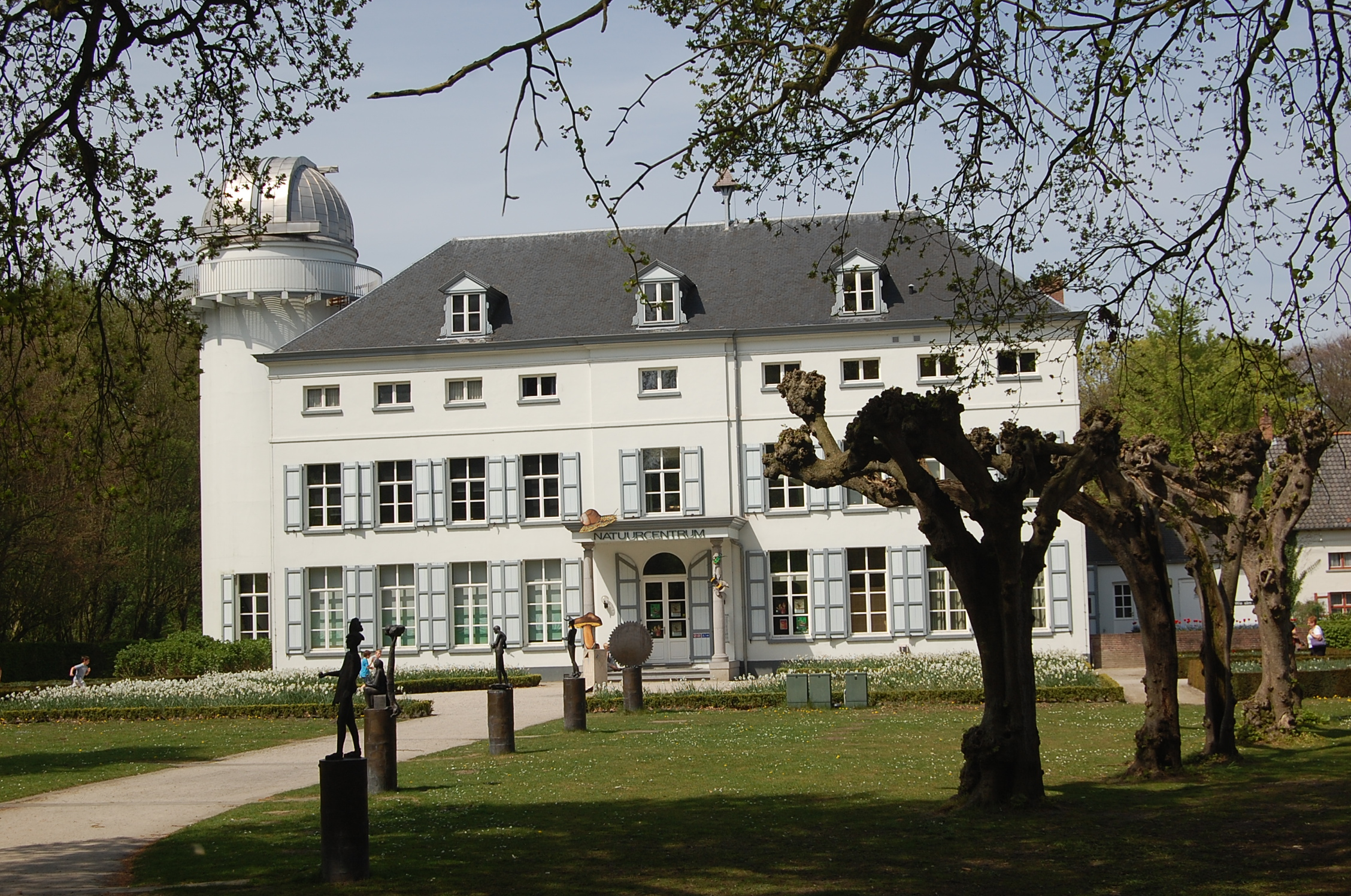 Kasteel Beisbroek, thans natuurcentrum en sterrenwacht